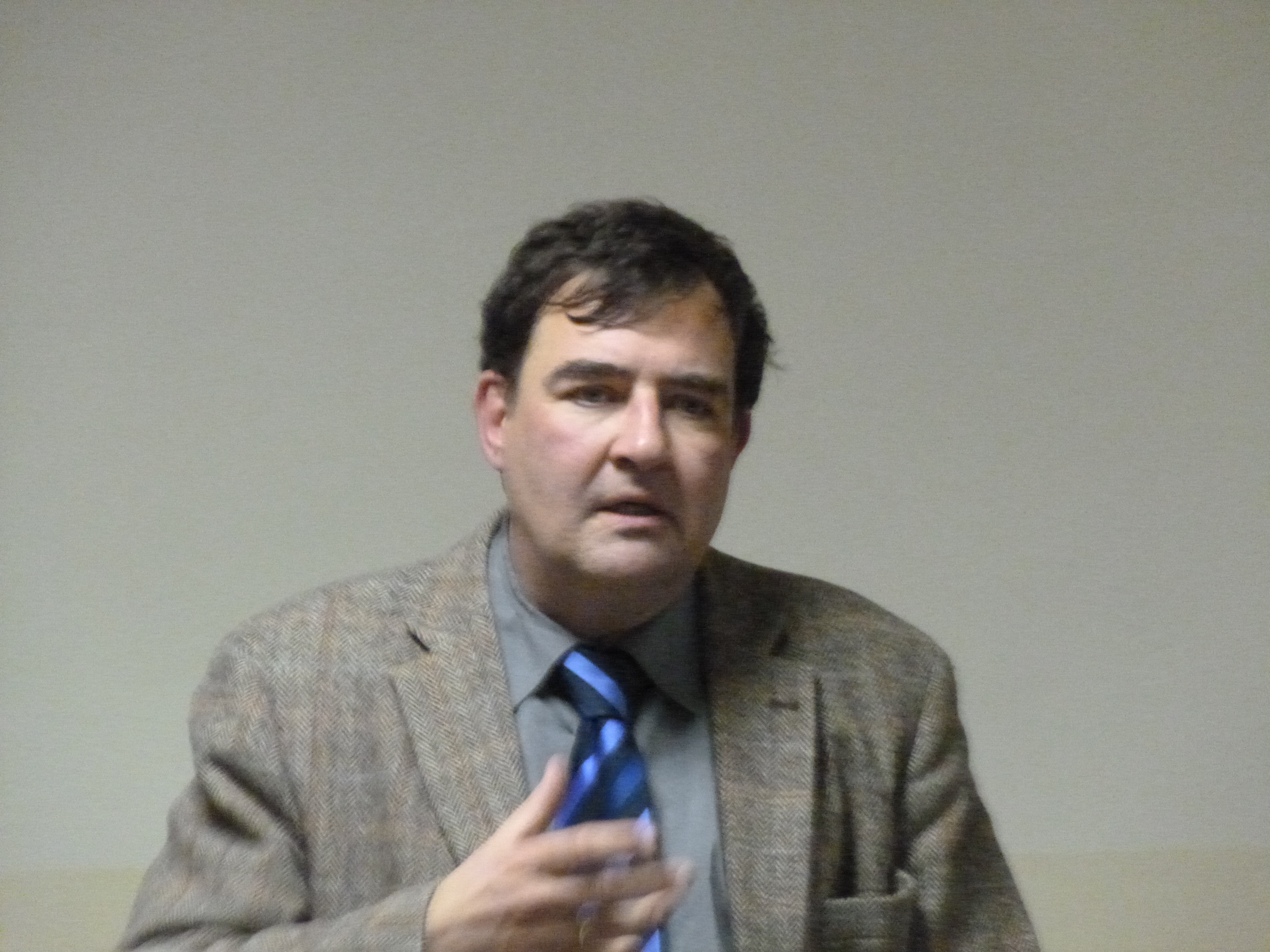 Thomas Kaufmann (Kirchenhistoriker) Authority control VIAF: 85035276